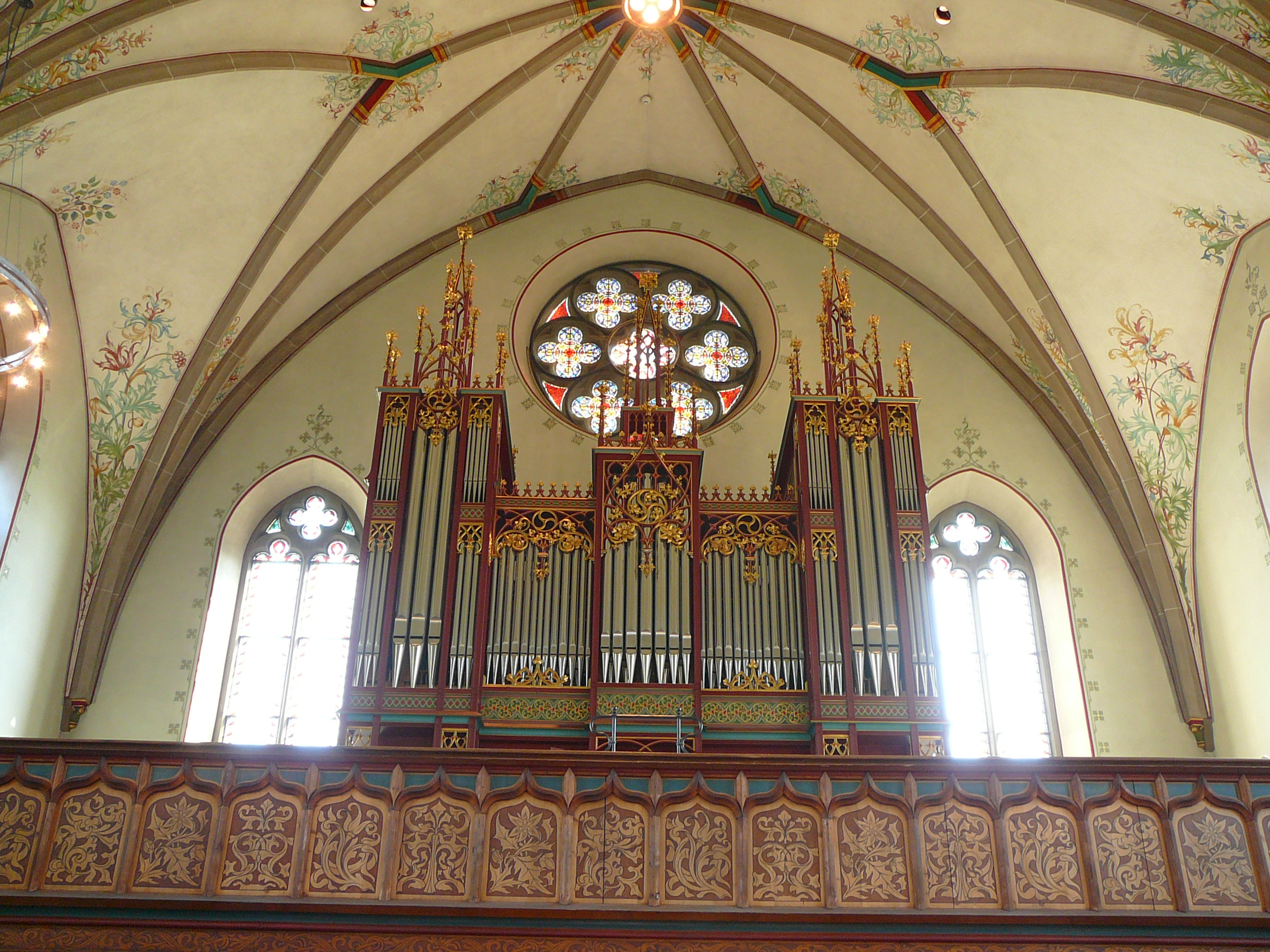 Dreifaltigkeitskirche Bülach Blick, Orgel